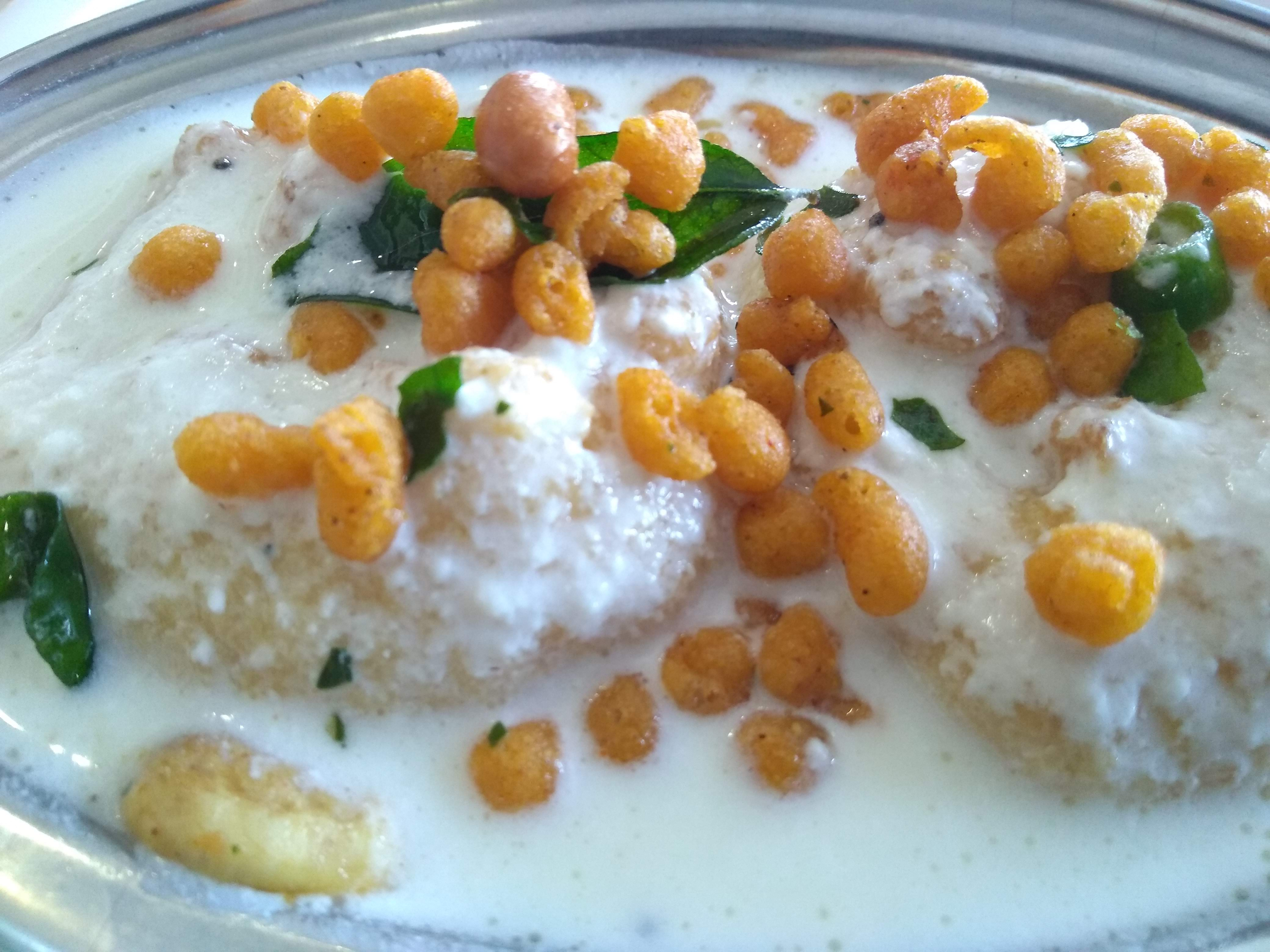 சேலத்தின் தயிர் வடை